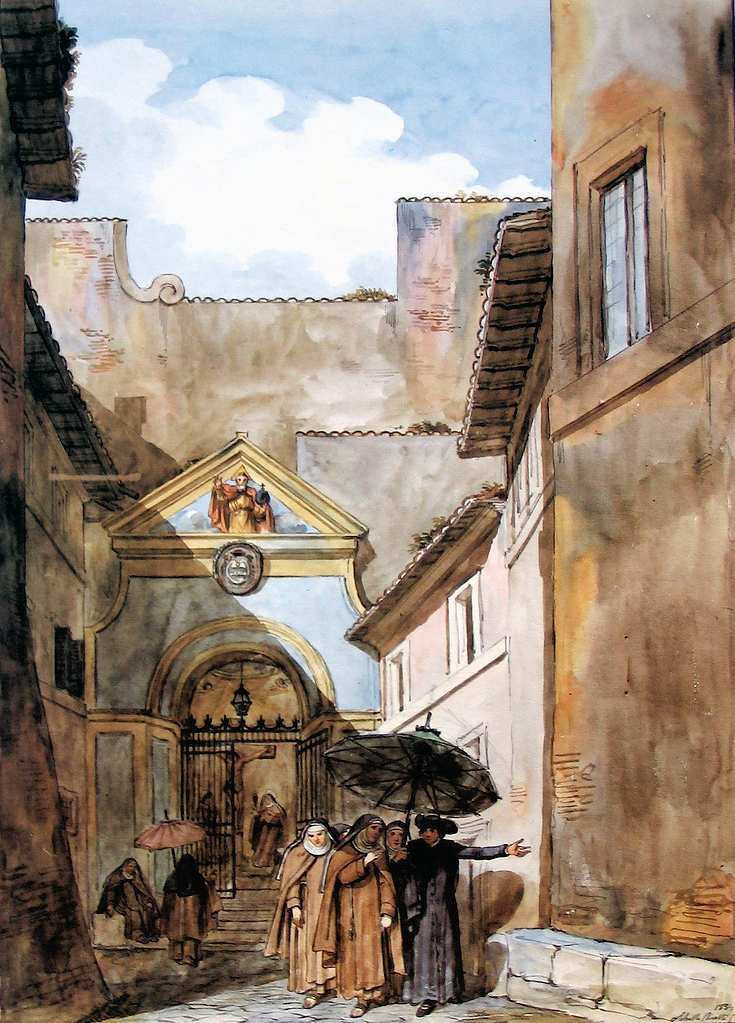 Chiesa distrutta di Santa Maria della Concezione ai Monti